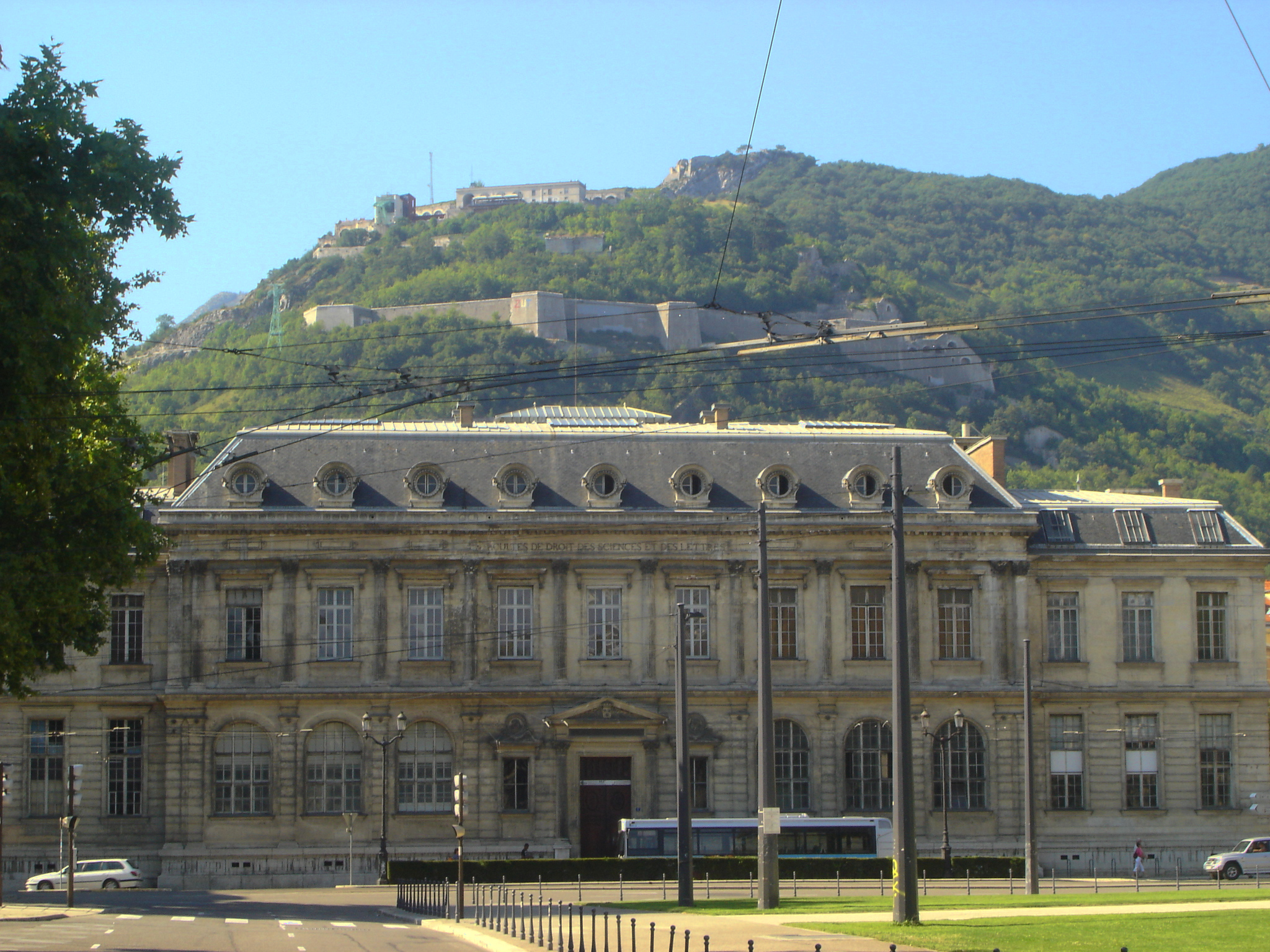 Bâtiment universitaire place de Verdun, Grenoble